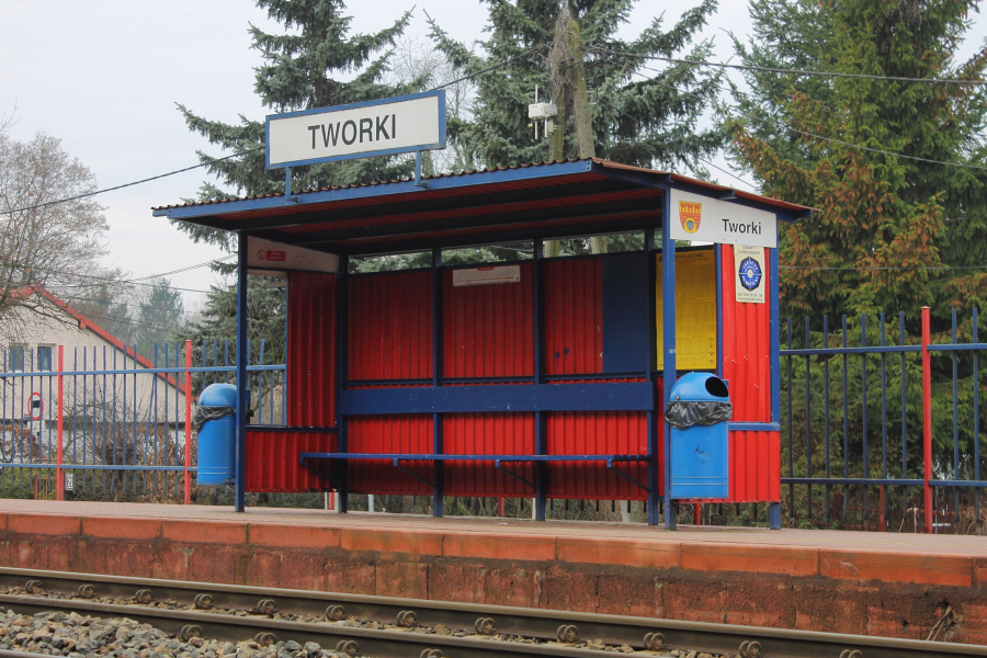 Wiata na peronie 2 przystanku Tworki.